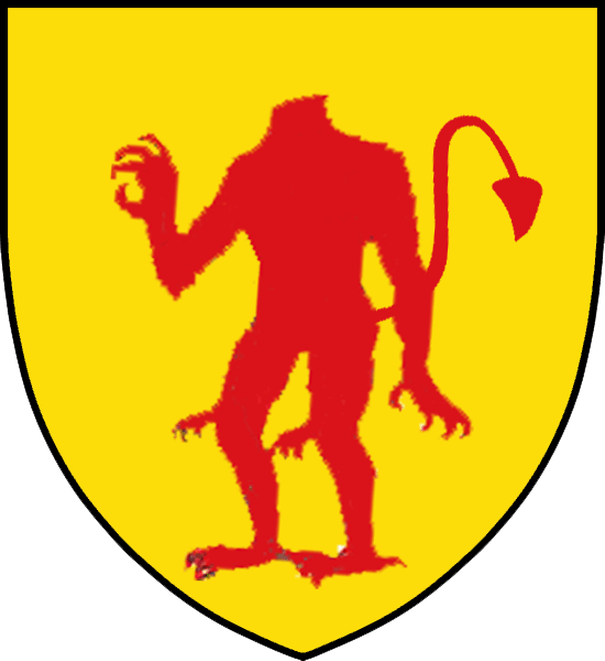 Vapensköld för svenska adelsätten Trolle